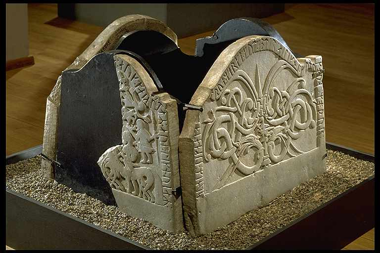 Inskriften lyder: Liknats söner (lät göra) ett gott minnesmärke efter Ailikn, god kvinna, moder till .. och Gairvat och Liknvi. Gud .. mot henne och mot dem som göra minnesvården .. som man kan se ..i Garda som var .. Motiv: G114 Ardrekistan Nyckelord: Runor Kategori: (09) Gravar, Runristning/runsten Inskriften lyder: Liknats söner (lät göra) ett gott minnesmärke efter Ailikn, god kvinna, moder till .. och Gairvat och Liknvi. Gud .. mot henne och mot dem som göra minnesvården .. som man kan se ..i Garda som var.